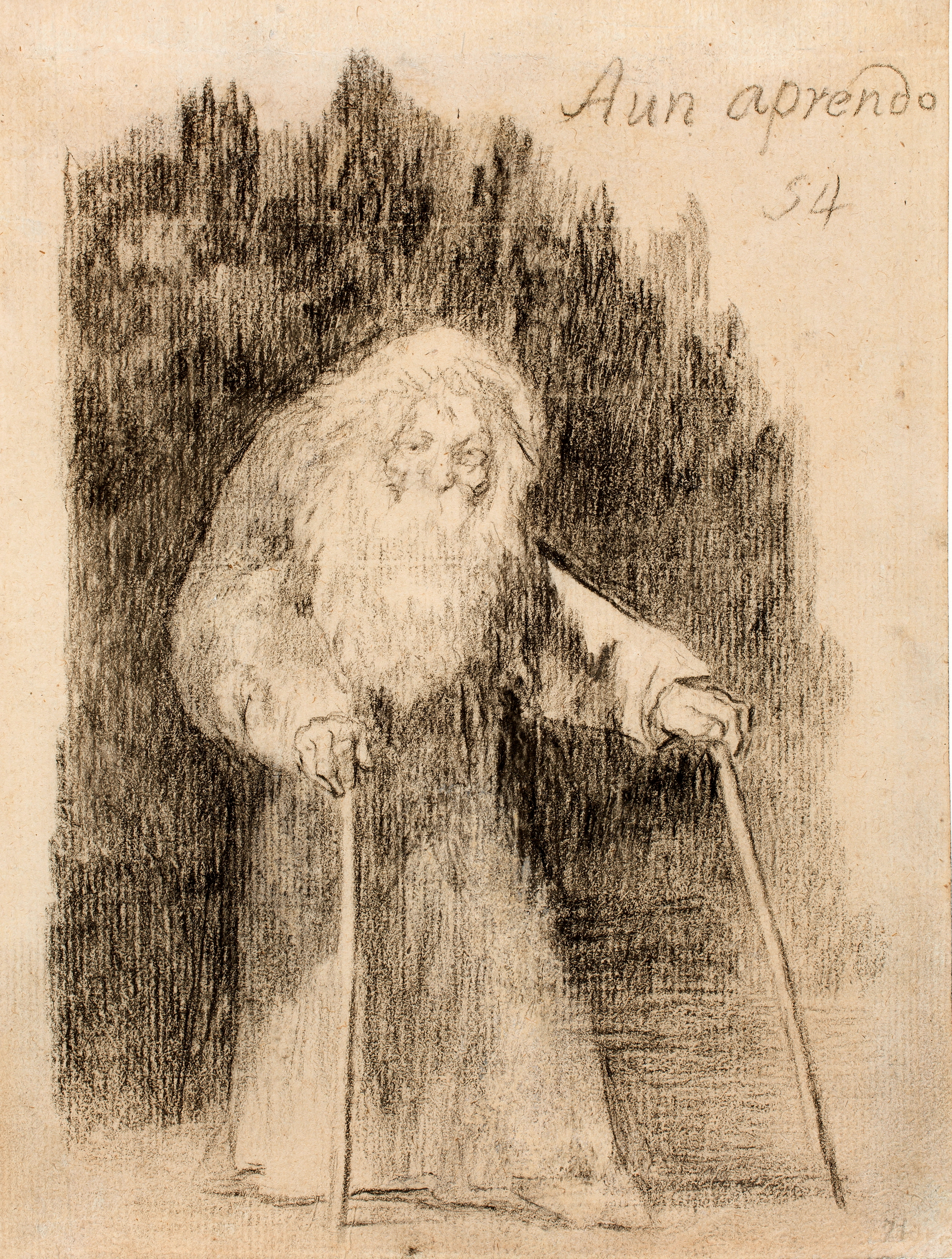 Francisco de Goya, «Aún aprendo», Álbum de Burdeos I o Álbum G, n.º 54, 1825-1828, dibujo a lápiz negro y lápiz litográfico sobre papel verjurado agrisado, 192 x 145 mm, museo del Prado (Madrid, España). Fuente Página web del museo del Prado. Restaurado en 2012.